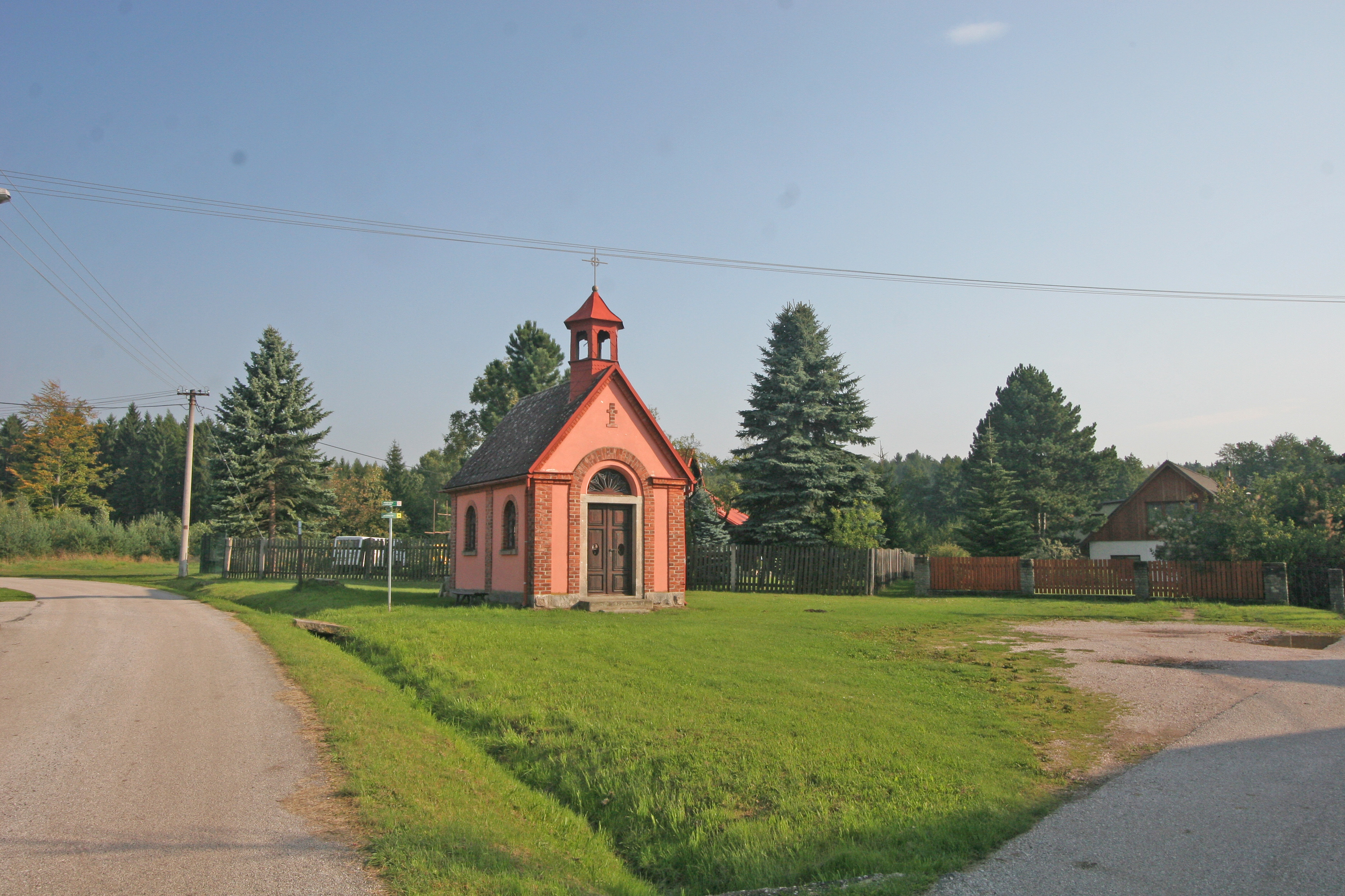 Červená kaplička, sever obce, na okraji lesa, Kocbeře.